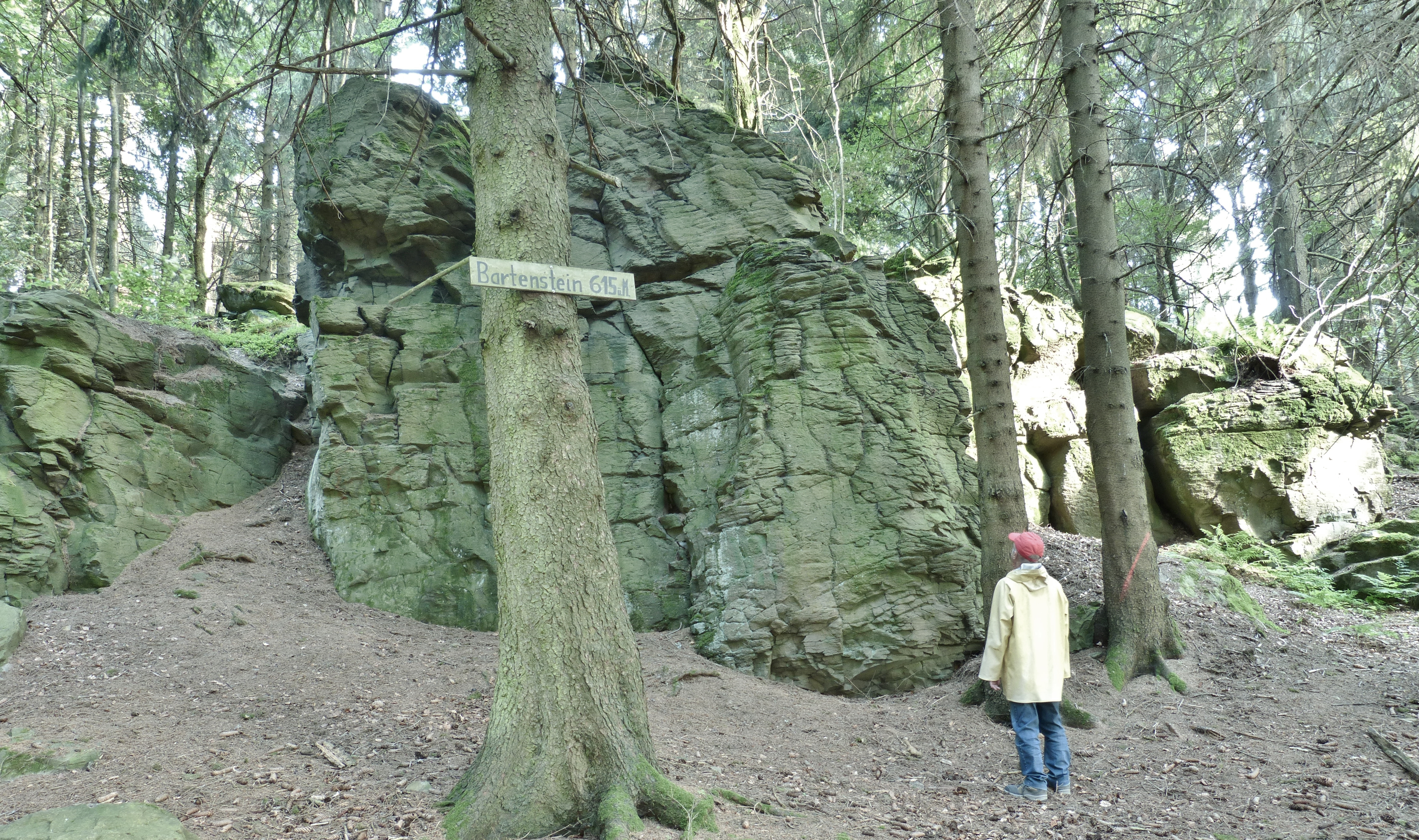 Die Felswand des Barsteingipfels